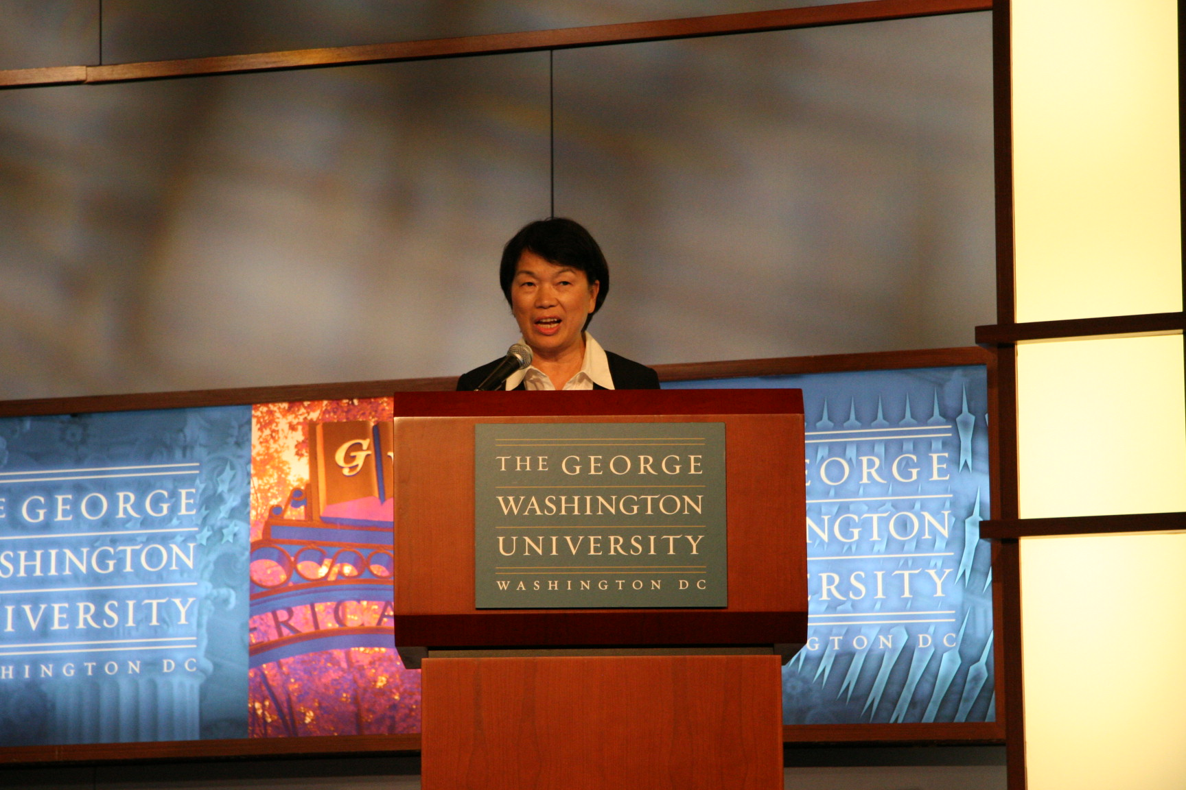 台灣文化部長龍應台(美國之音石瑛、金刀拍攝)